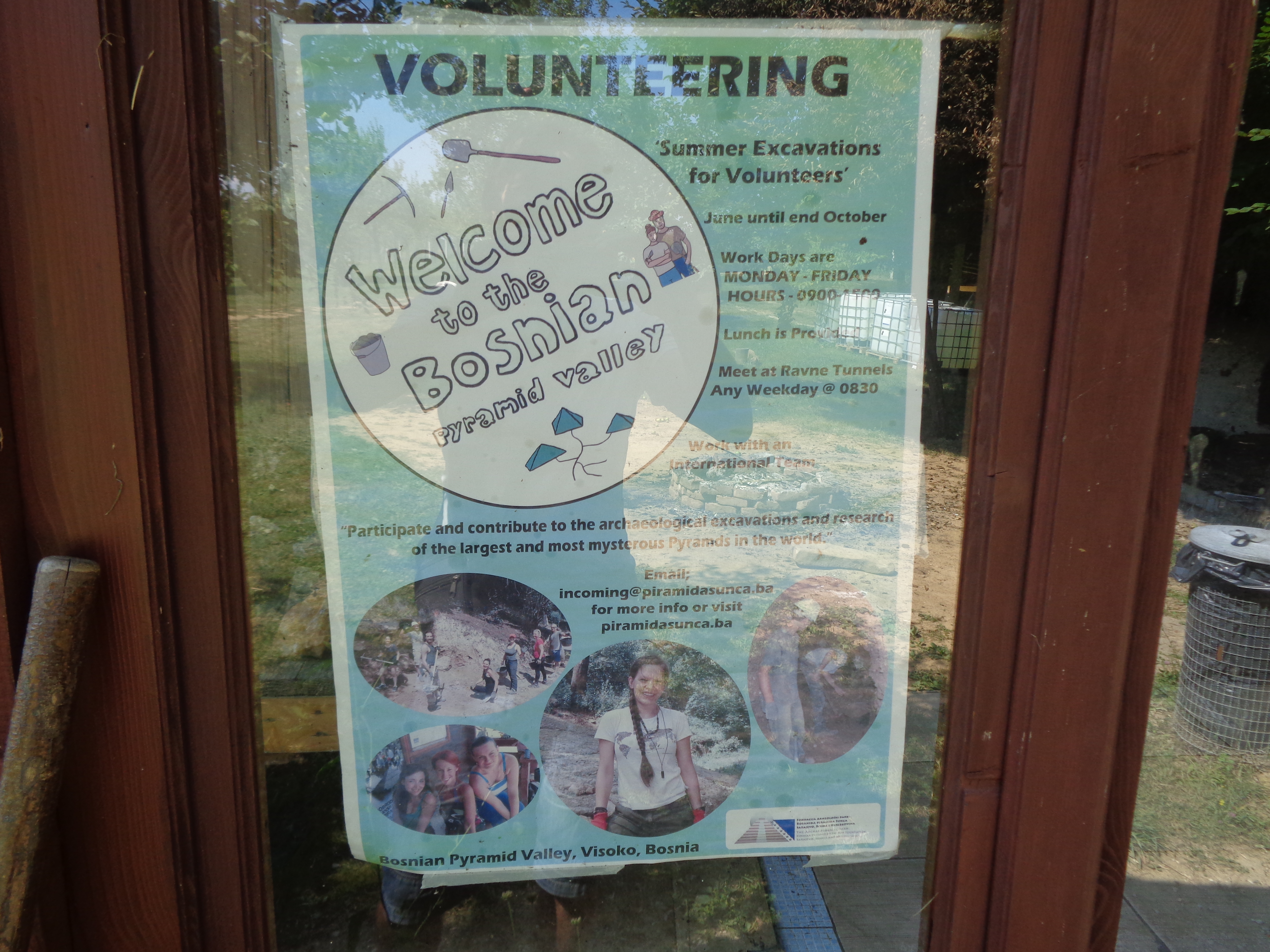 Oben auf dem Plateuder Pyramide des Mondes angekommen steht eine Holzhütte und im Fenster dieses Plakat für Freiwillige die bei den Ausgrabungen mitmachen wollen.